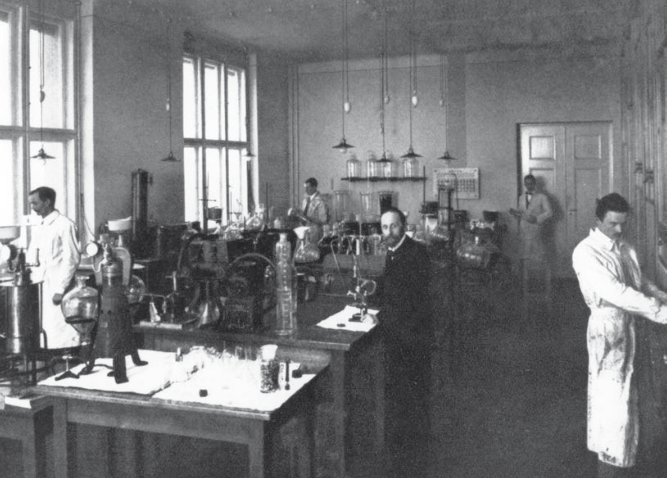 Richard Martin Willstätter (* 13. August 1872 in Karlsruhe; † 3. August 1942 in Muralto), Kaiser-Wilhelm-Institut für Chemie in Berlin-Dahlem.